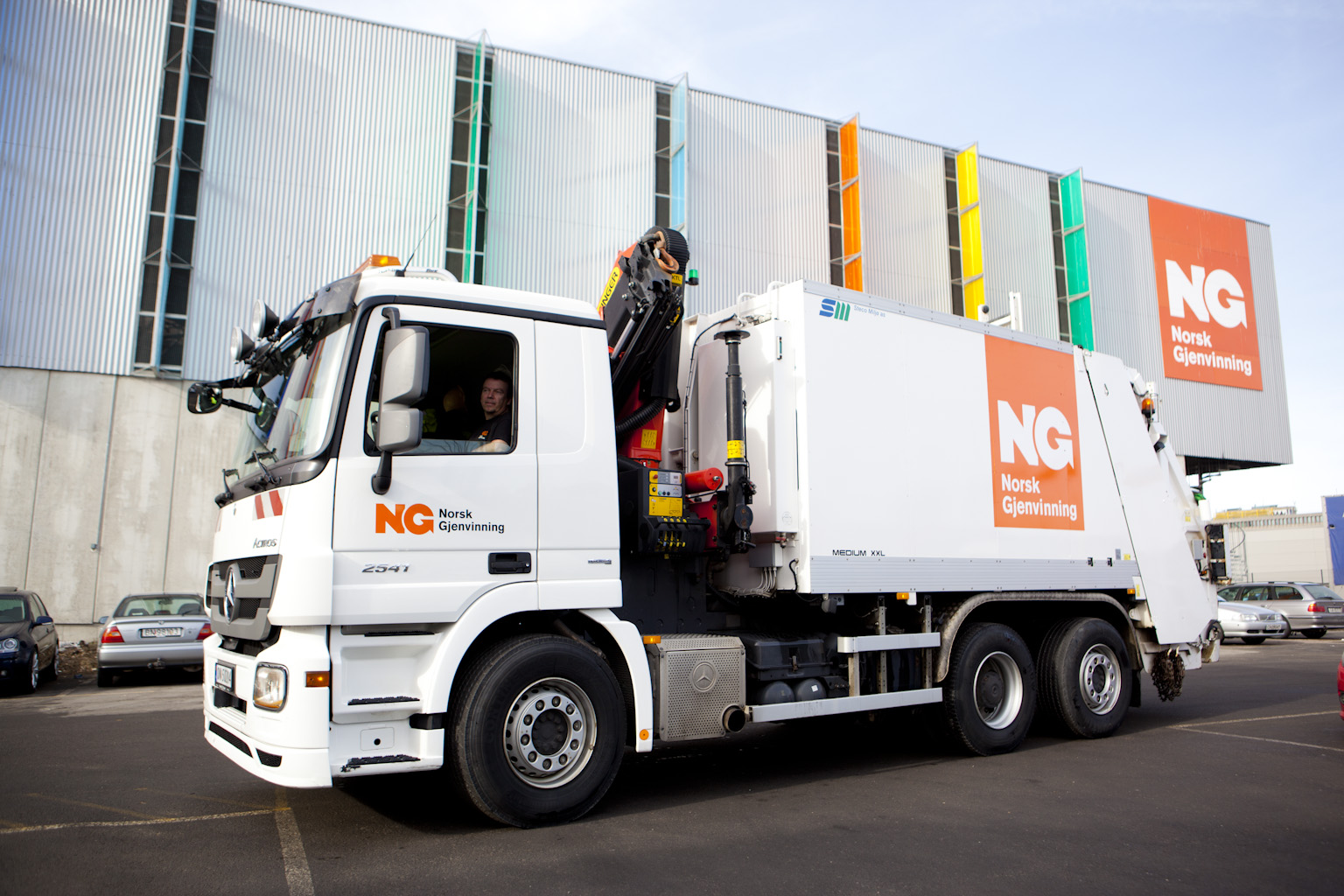 Groruddalen Miljøpark, Norsk Gjenvinnings hovedanlegg i Oslo.